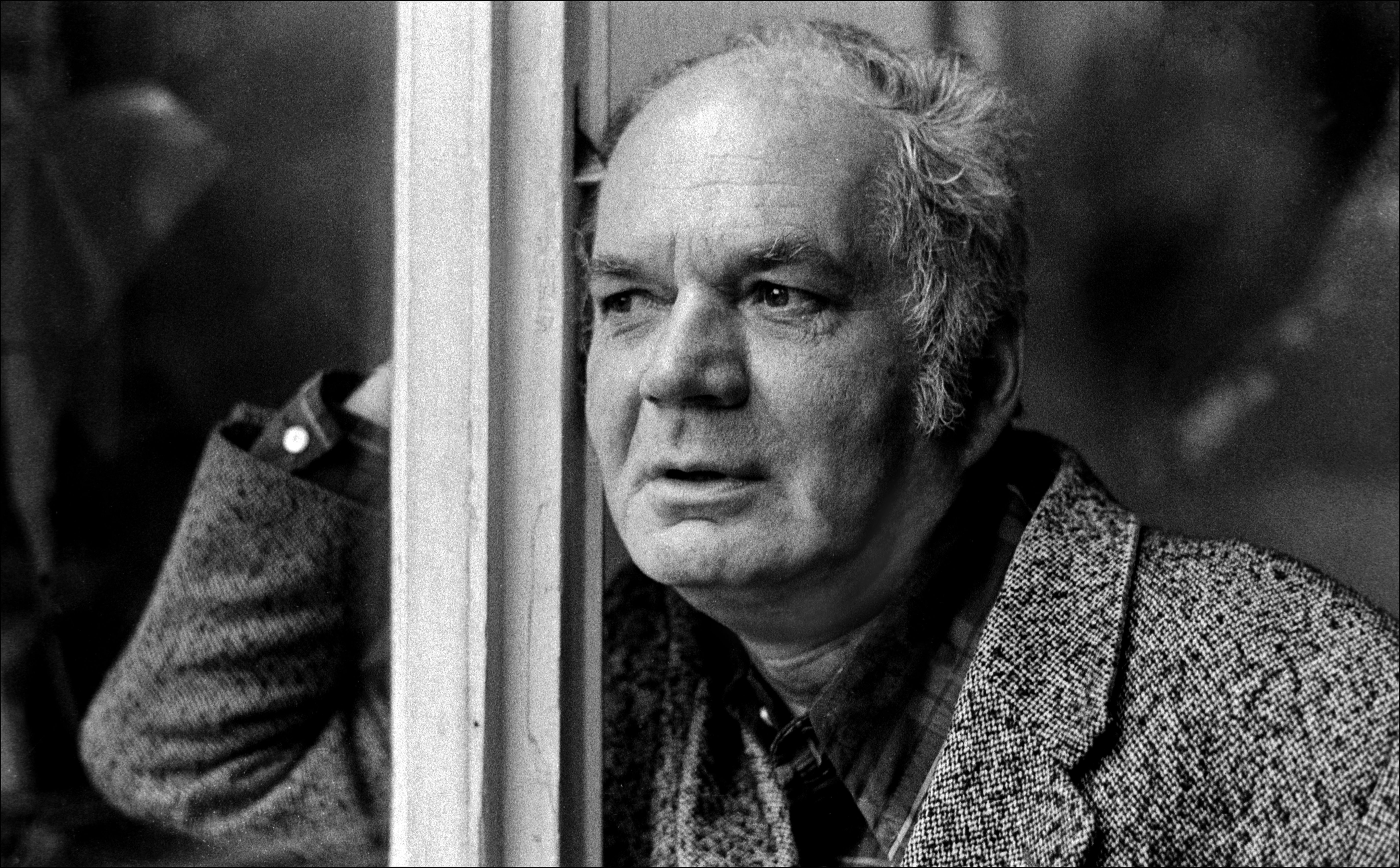 Maler